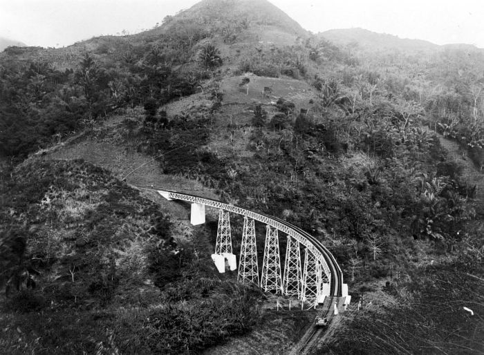 Repronegatief. Een spoorbrug over de Tjiherang tussen Malangbong en Tjipeundeuj, Preanger, West-Java